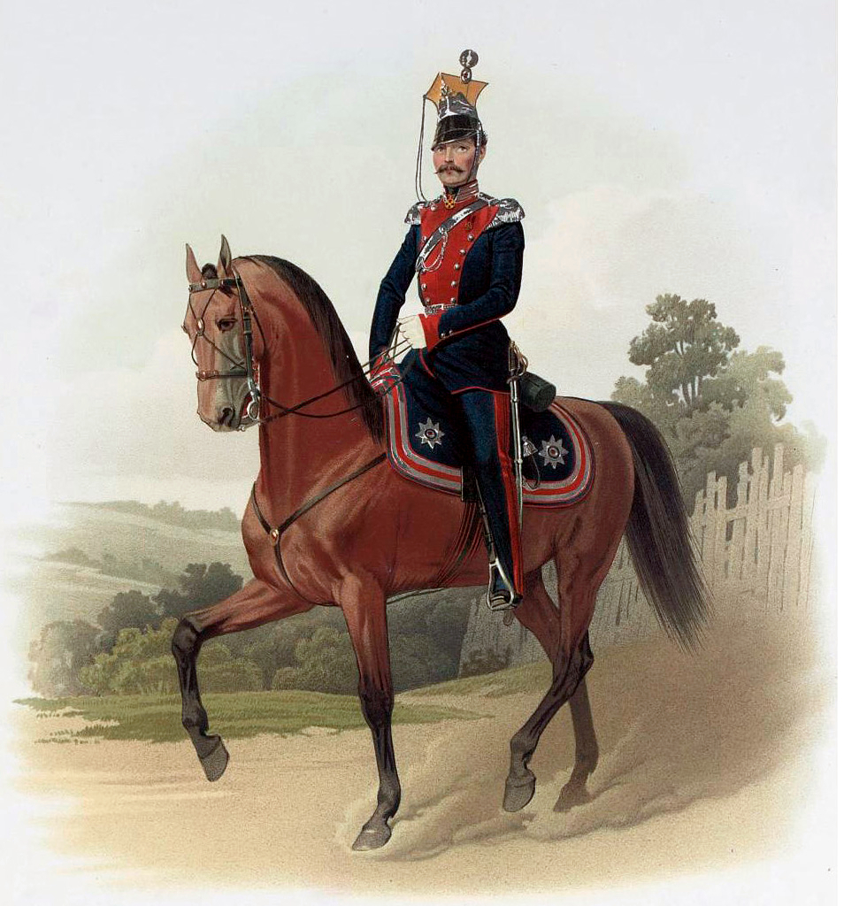 Штаб-Офицер Лейб-Гвардии Уланского Его Величества полка (В парадной форме) 15 марта 1855